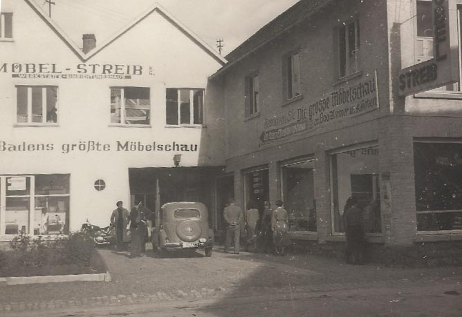 furniture store in Eschelbronn, Möbel Streib